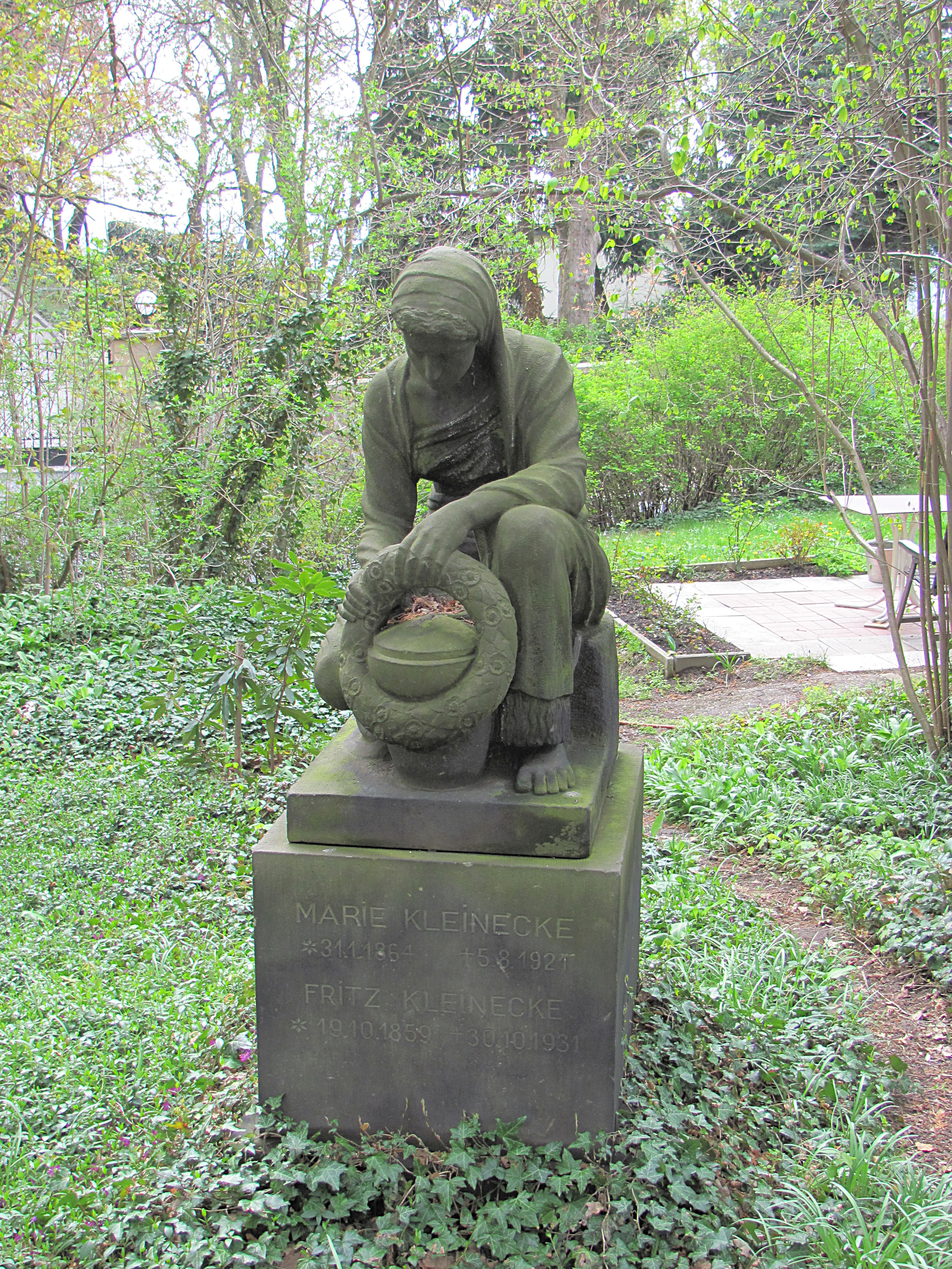 Grabmal von Bildhauer Ebe für den Schwiegervater Kleinecke, heute im ehemaligen Grundstück der Bildhauerwerkstatt fotografiert am 16. April 2011 am "6. Tag der Offenen Aussicht" in Radebeul, Betreten des Grundstücks mit Erlaubnis des anwesenden Grundstücksbesitzers